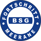 Logo BSG Fortschritt Meerane